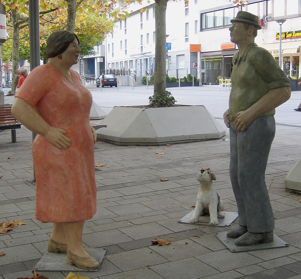 „Tanzendes Paar mit Hund“ der Bildhauerin Christel Lechner (Oktober 2003) auf dem Marktplatz in Iserlohn.